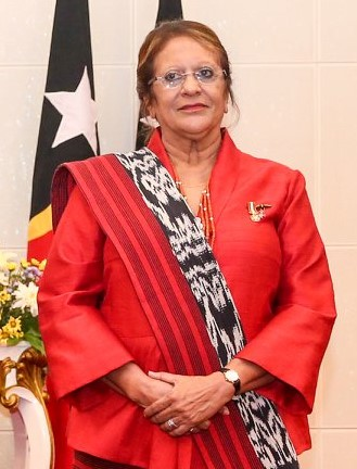 Botschafterin Natália Carrascalão Antunes bei der Vereidigung